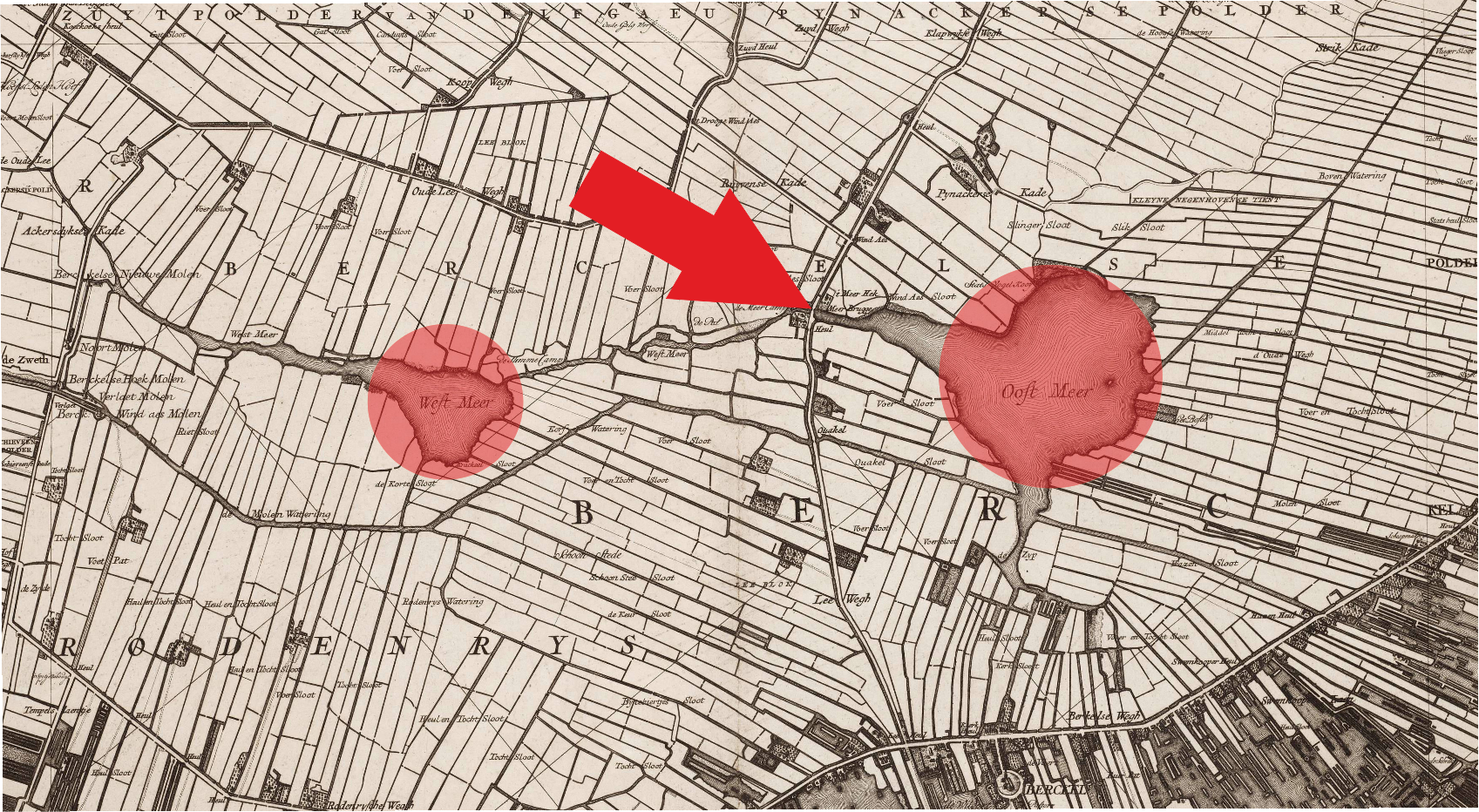 De pijl wijst naar de plaats, halverwege het Berkelse Westmeer en het Oostmeer, waar een tolhek was geplaatst en vanwaar het water in de vaart die beide meren met elkaar verbond vanaf de weg eenvoudig kon worden bereikt.